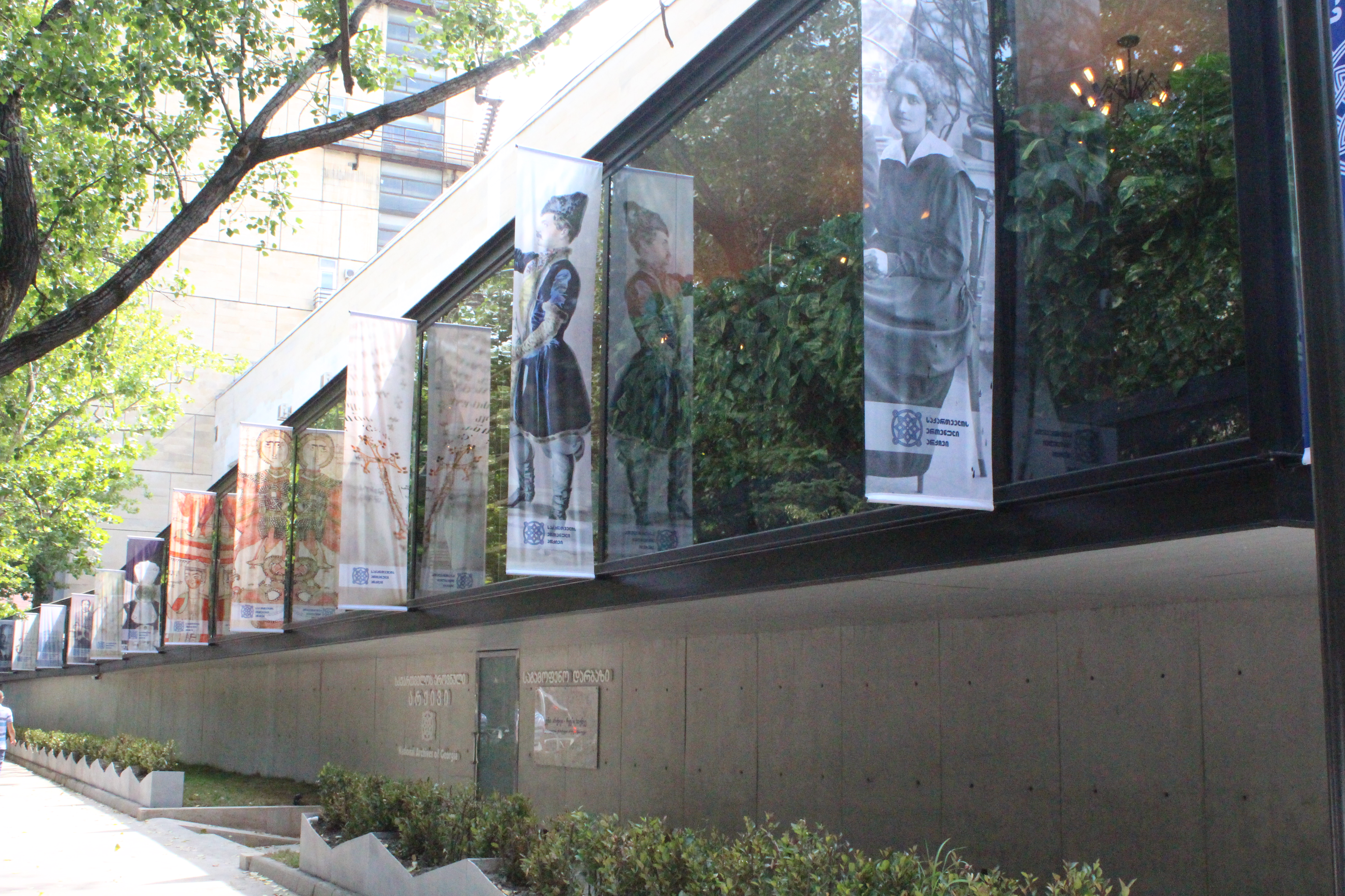 ეროვნული არქივის საგამოფენო გალერეა. 2016 წელი